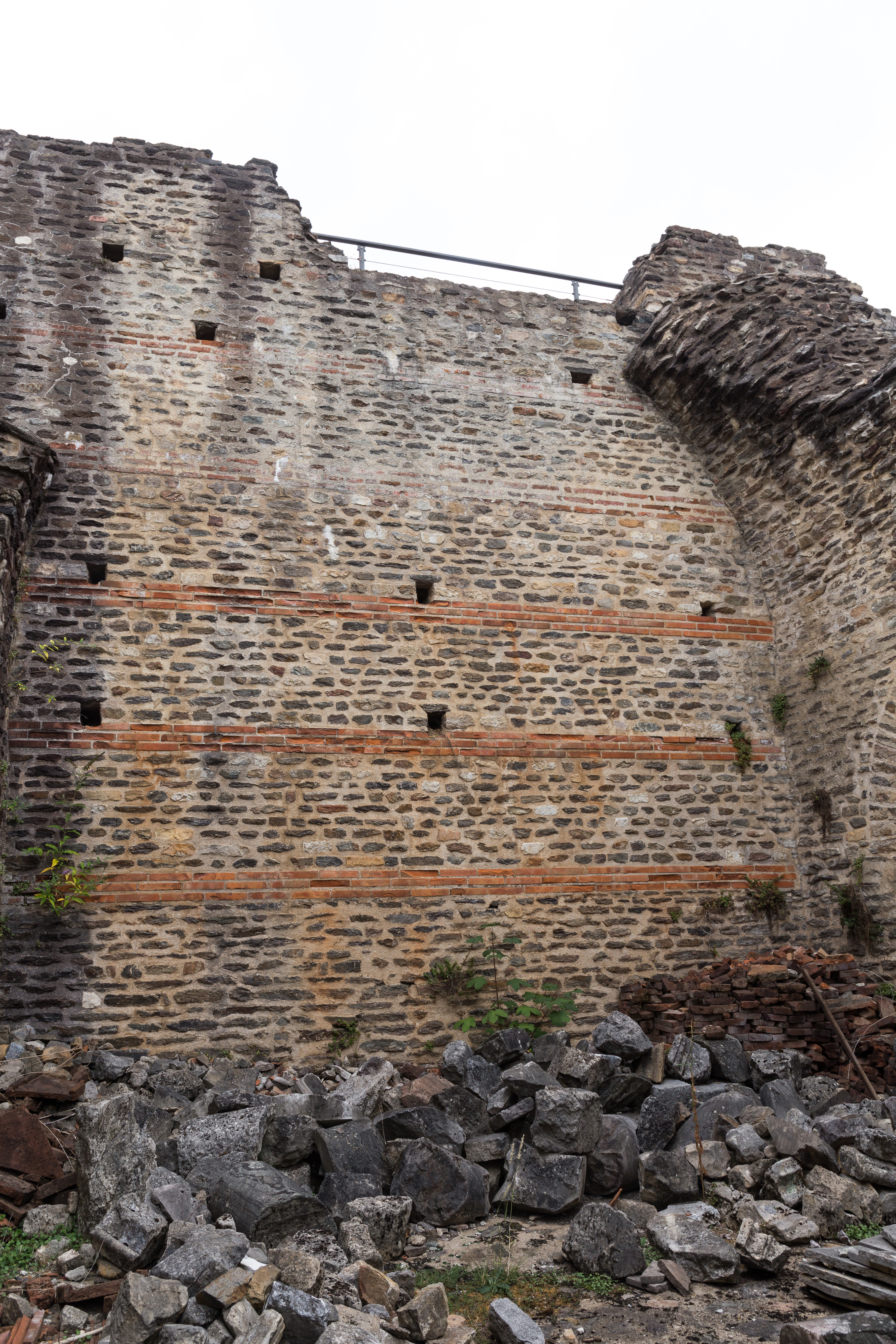 Odéon antique dans le 5e arrondissement de Lyon : mur de soutènement; .